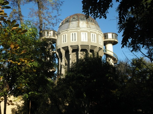 Castelul de apă